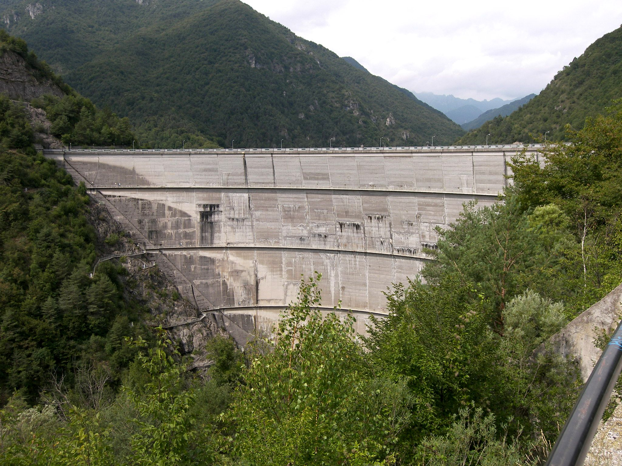 Die Staumauer des lago di Valvestino